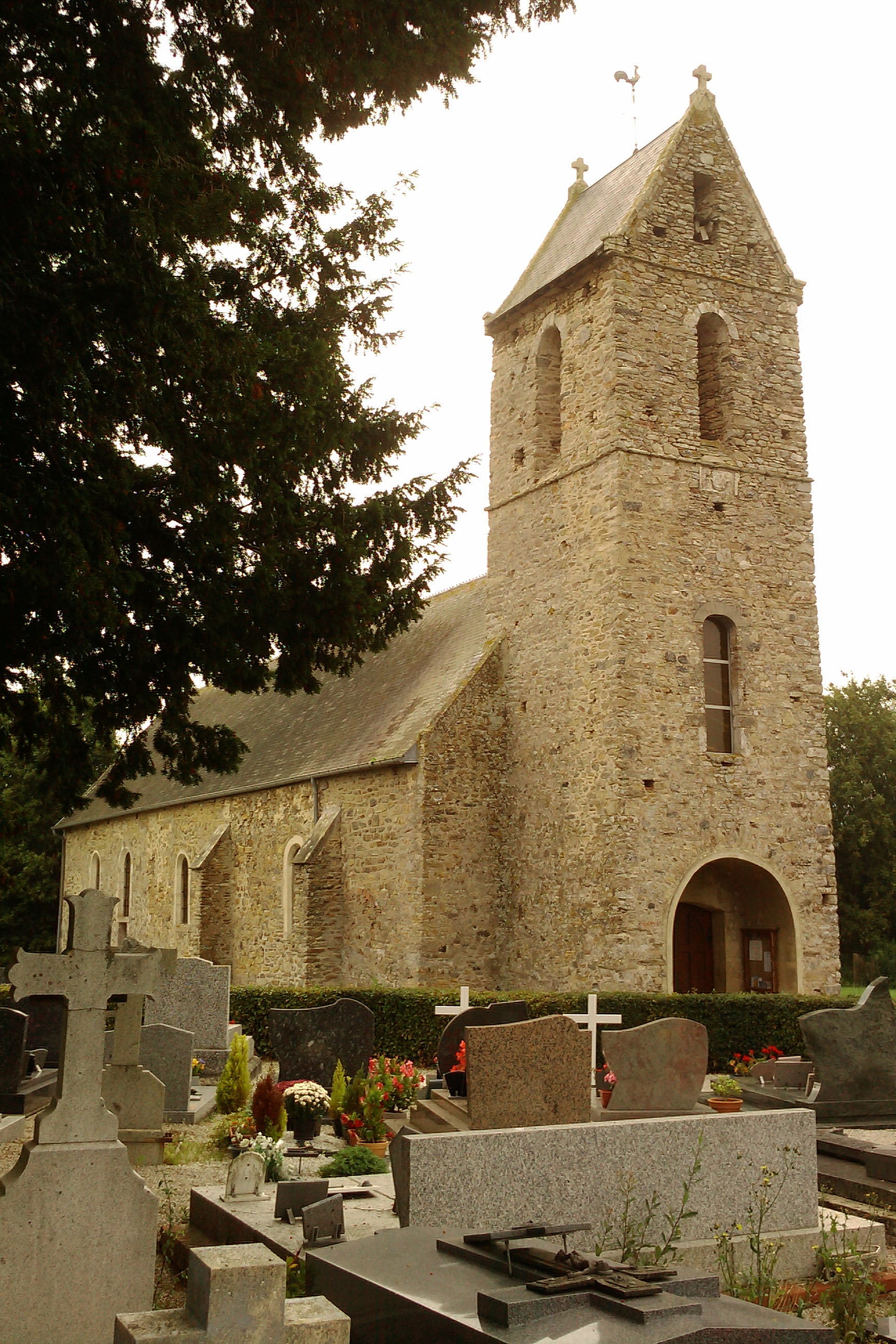 Église Saint-Pierre du Mesnil-Eury